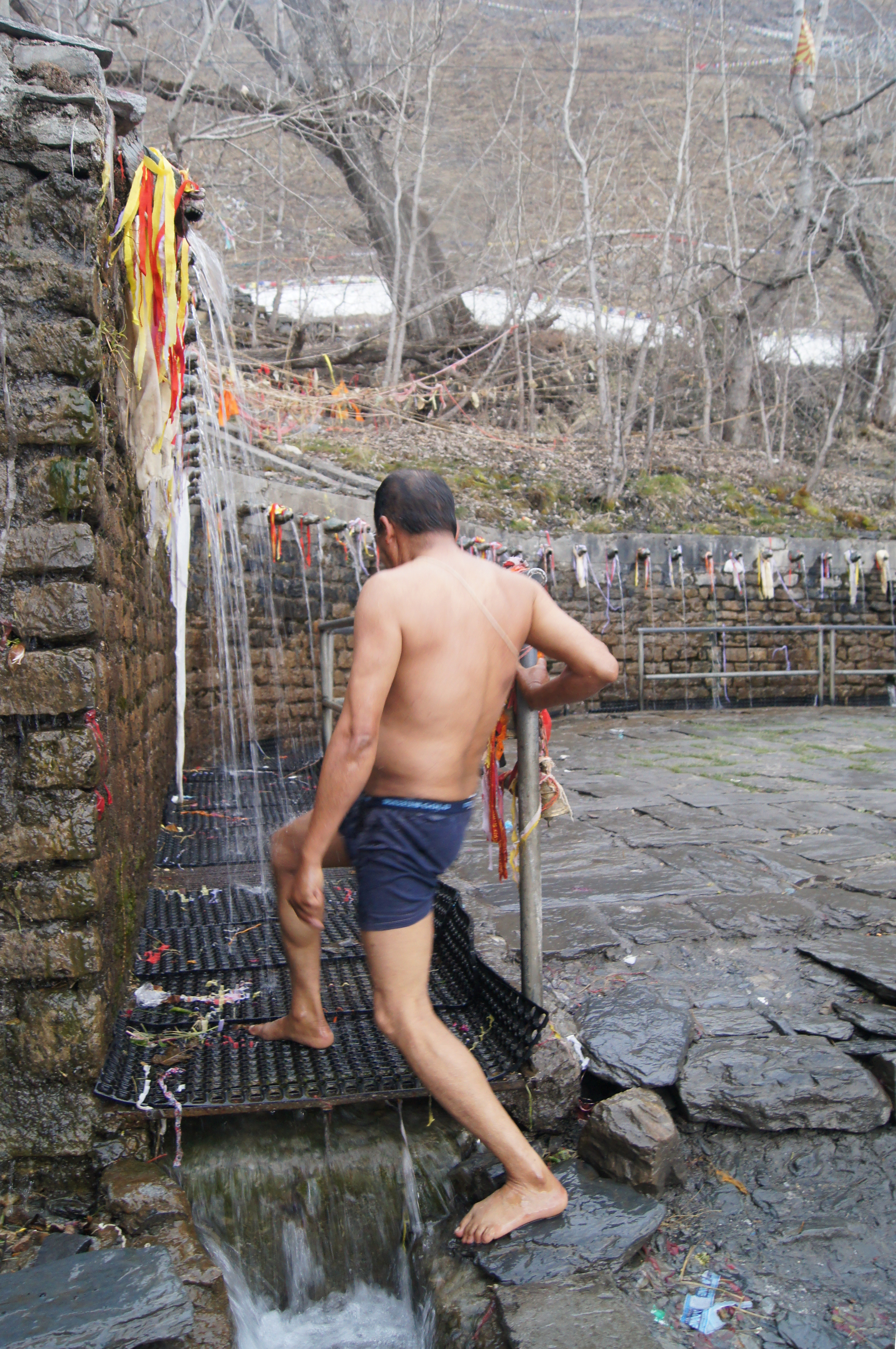 Ein Pilger lässt sich reinigen von heiligem Wasser aus 108 Quellen im Tempel von Muktinath (Region Mustang, Nepal)